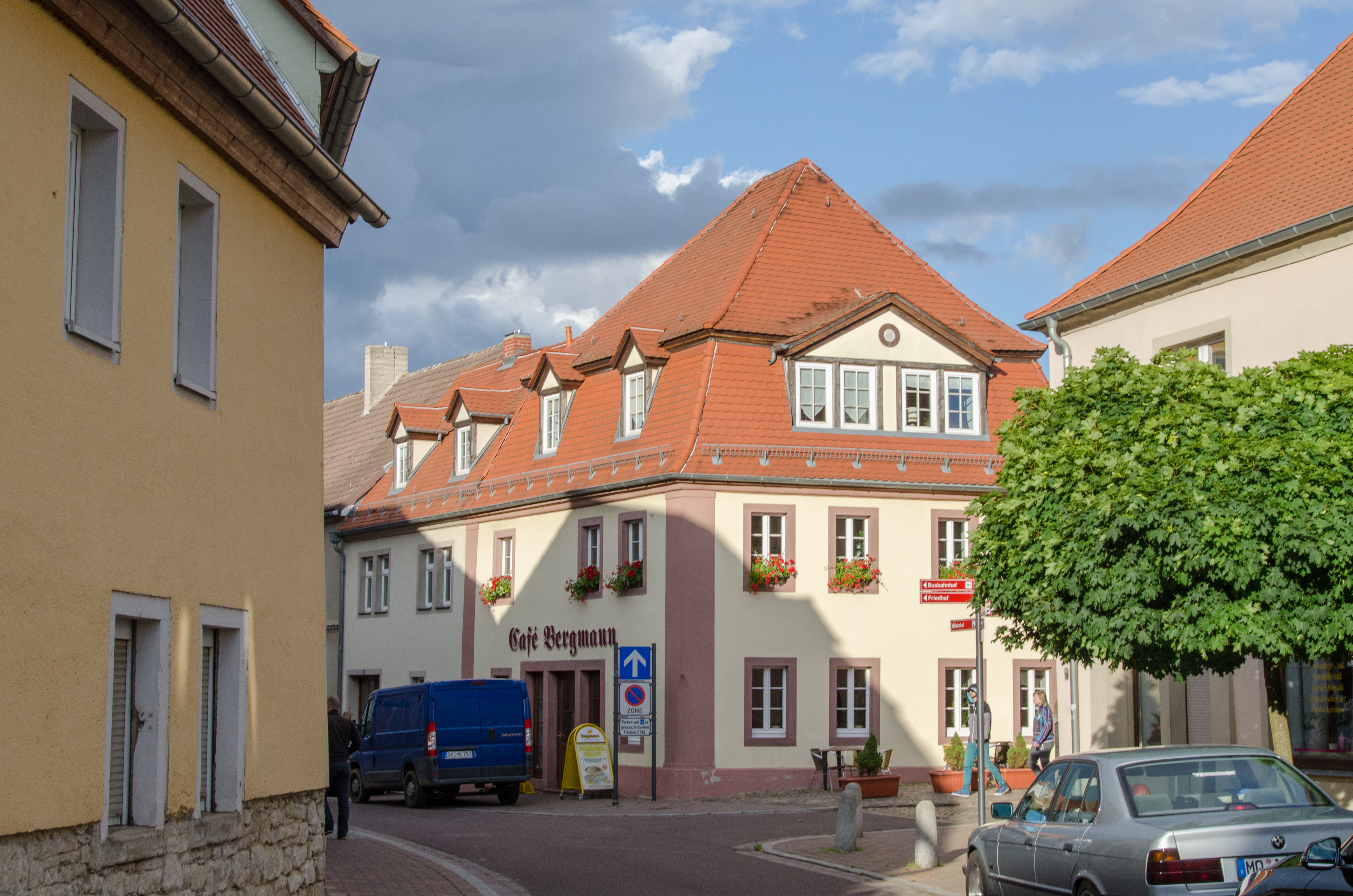 Querfurt, Klosterstraße 2